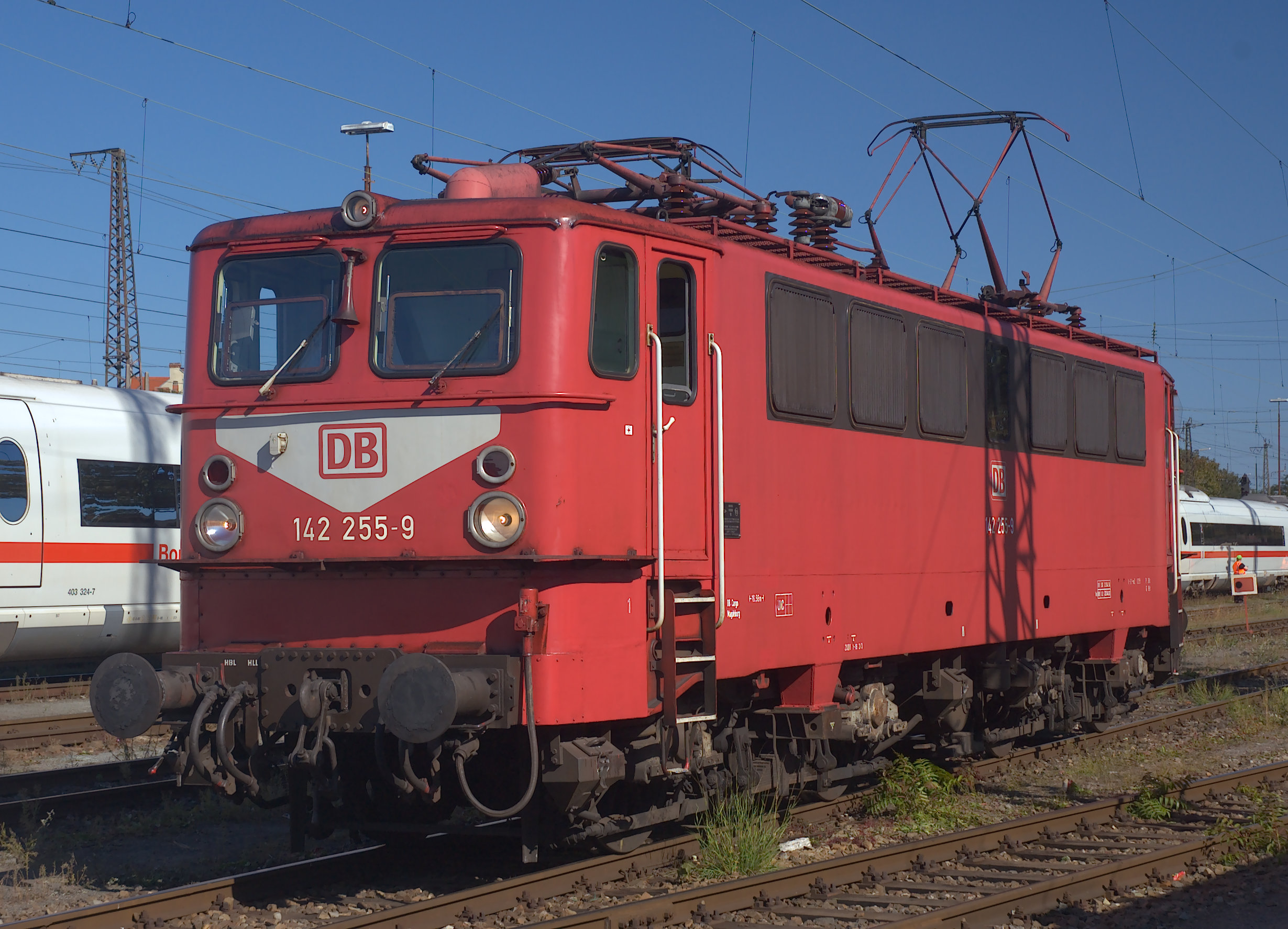 E-Lok 142 255-9